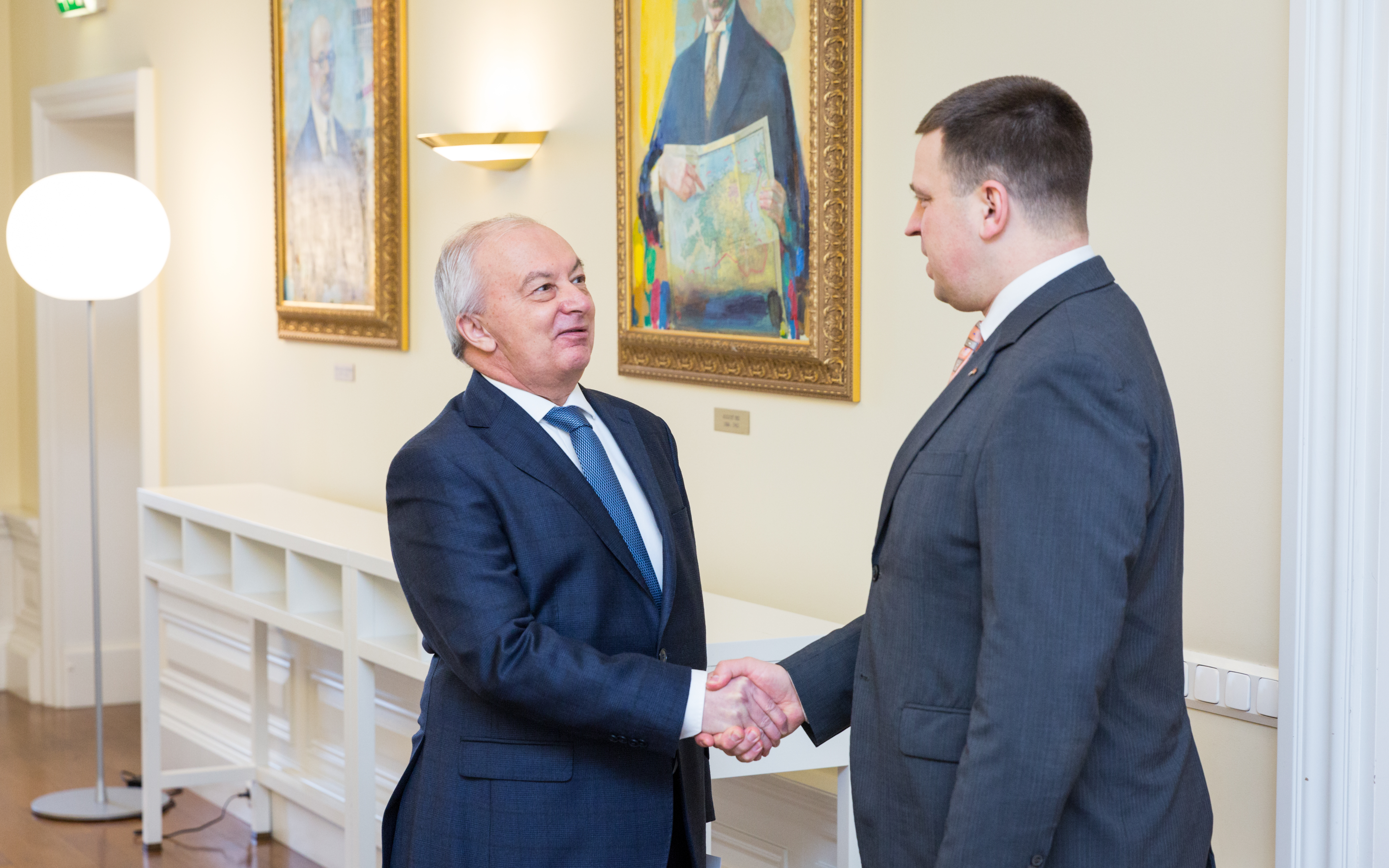 Süleyman İnan Özyıldız, Türgi suursaadik Eestis